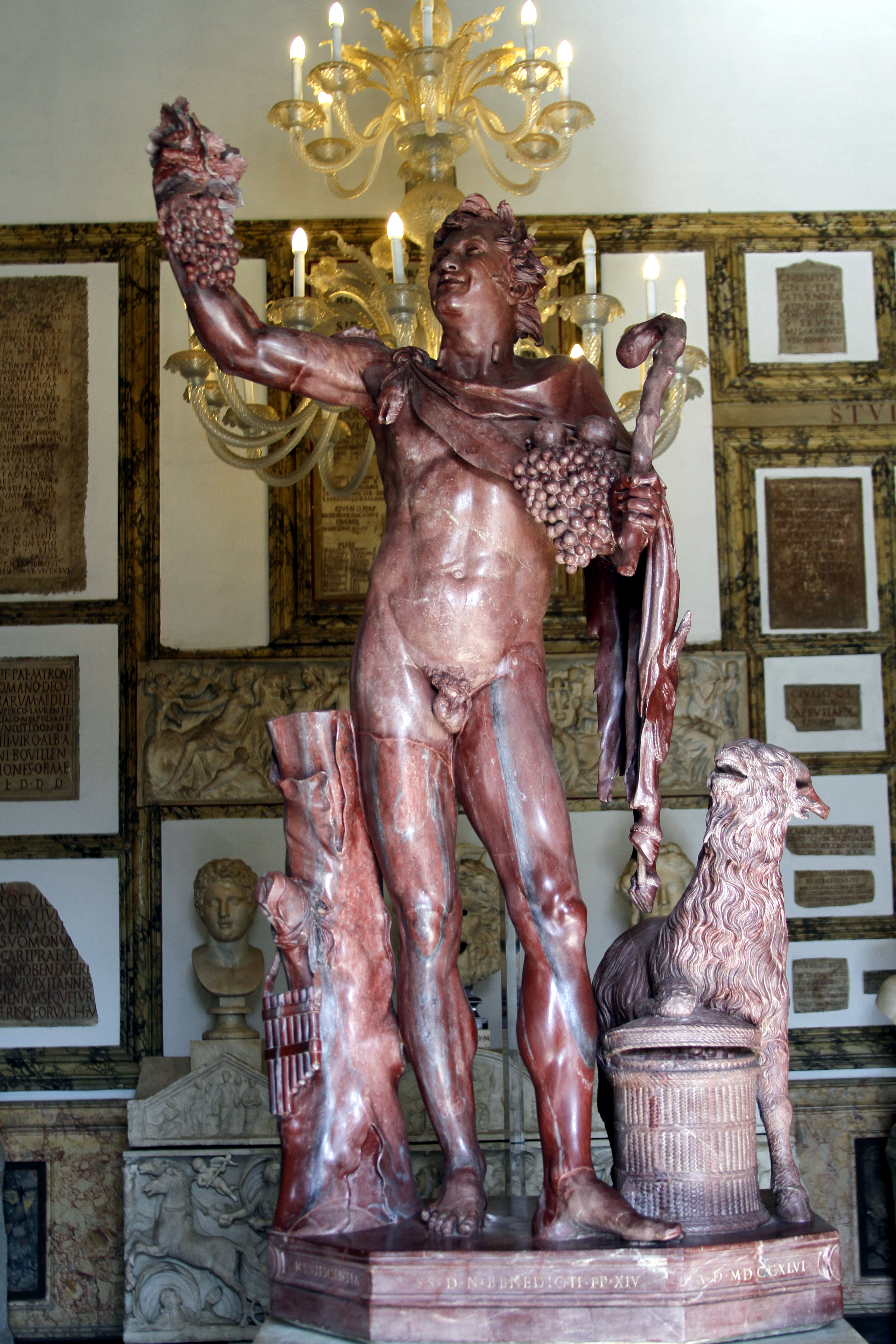 Palazzo Nuovo - Musei Capitolini - Rome